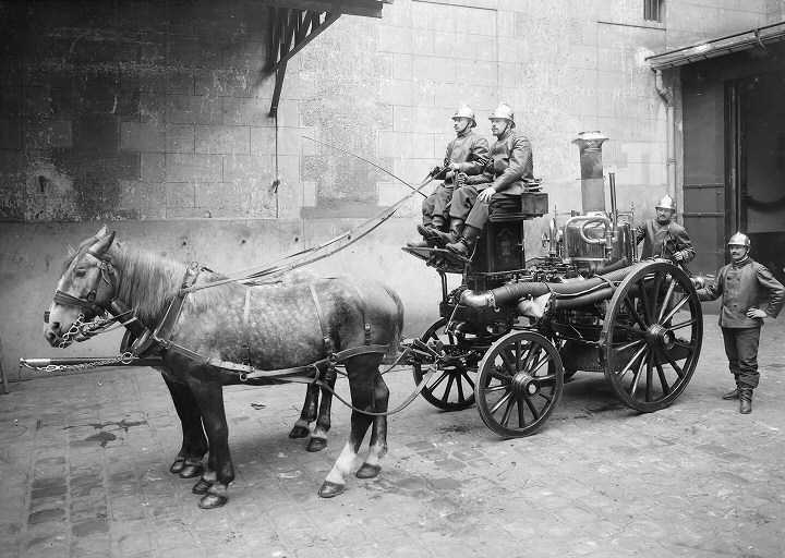 Régiment de sapeurs-pompiers de Paris. La pompe à Vapeur Durenne & Krebs était patentée par Arthur Constantin Krebs en 1886. Photo ca. 1900